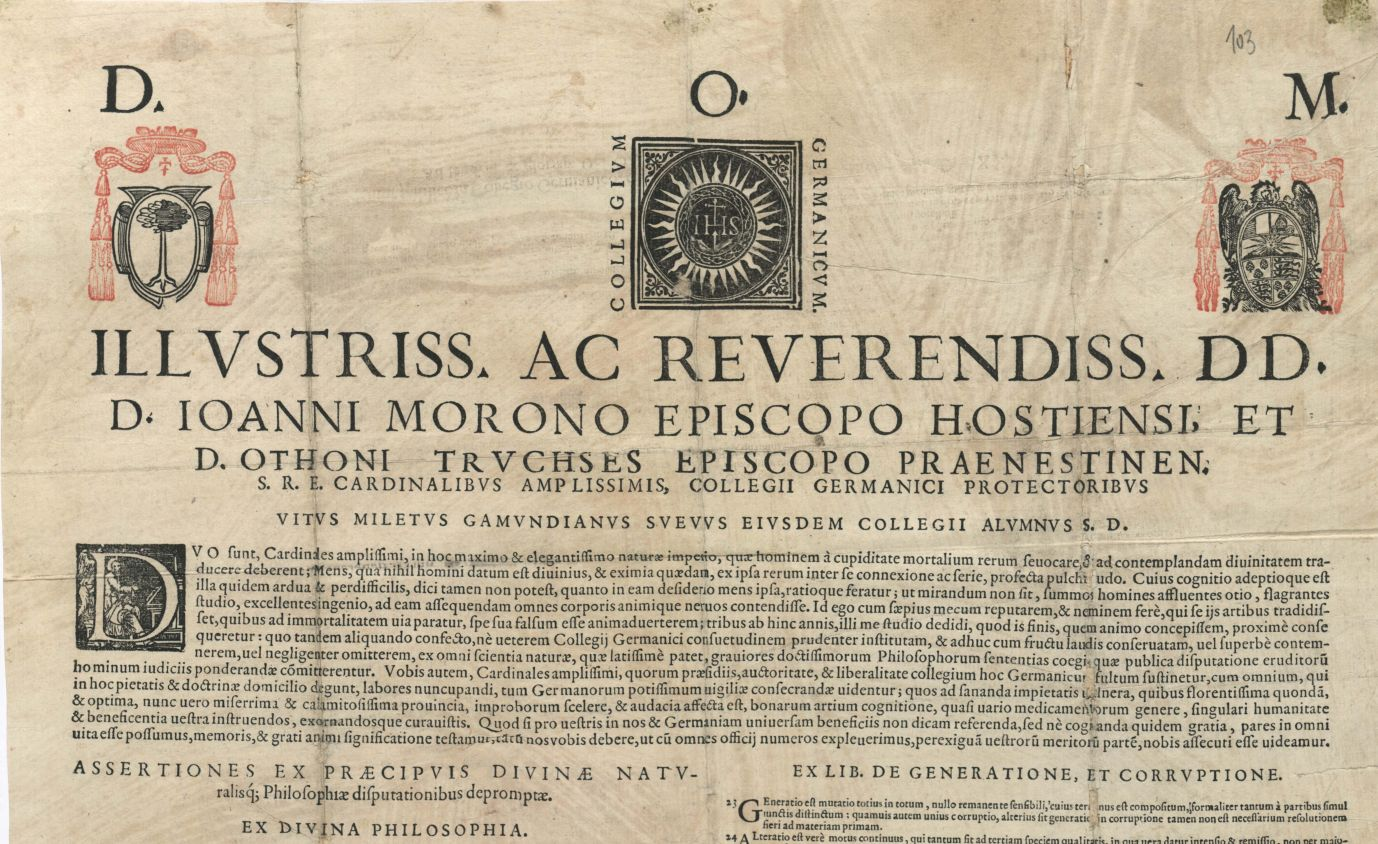 Thesenblatt des Vitus Miletus im Collegium Germanicum